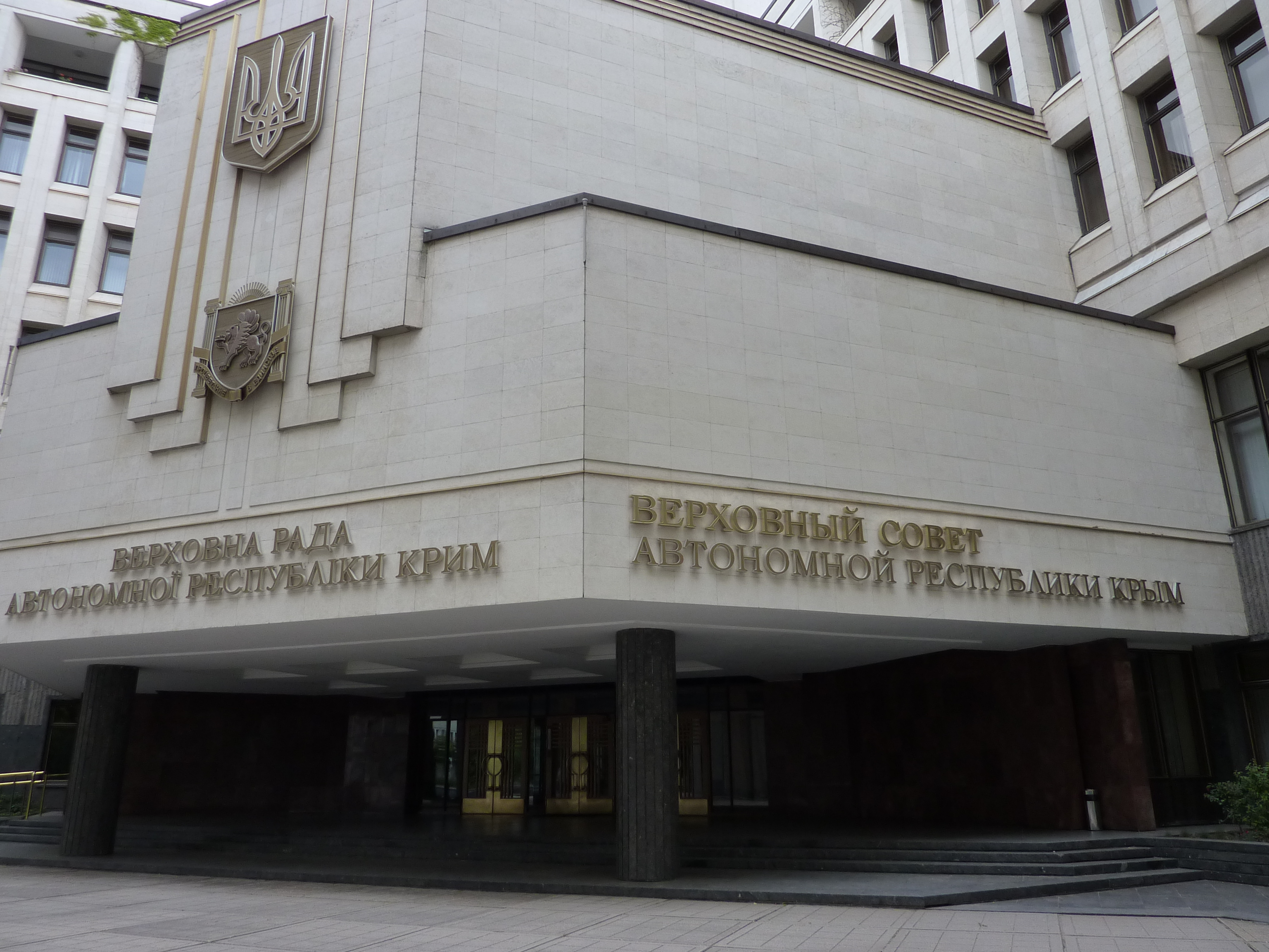 Верховный совет автономной республики Крым